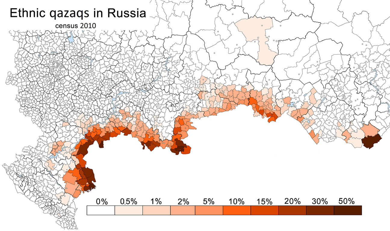 Процент казахов в районах России по переписи населения 2010г.